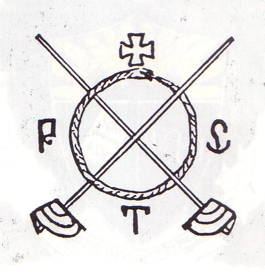 Bundeszeichen der Studentenverbindung Ruthenia in Sankt Petersburg